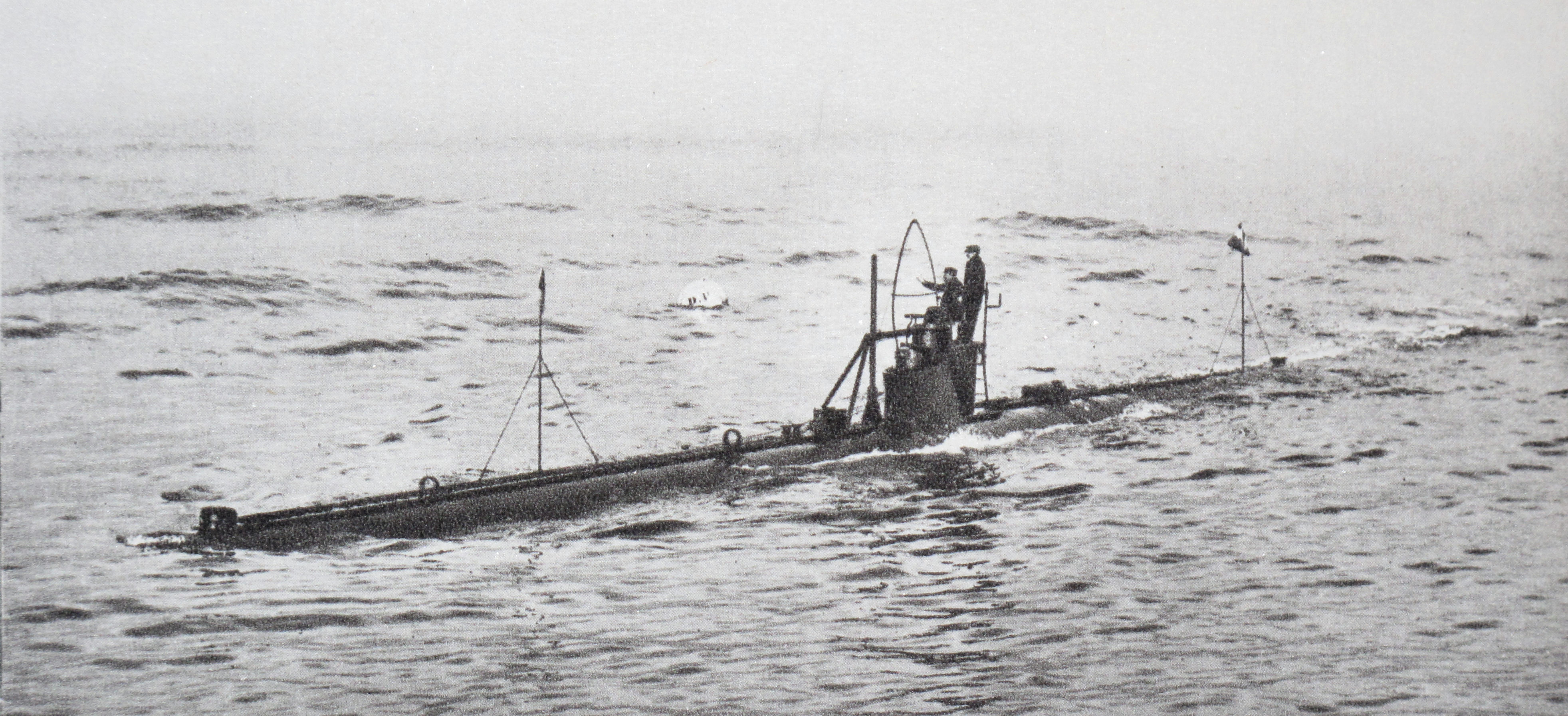 French submarine Gustave Zédé